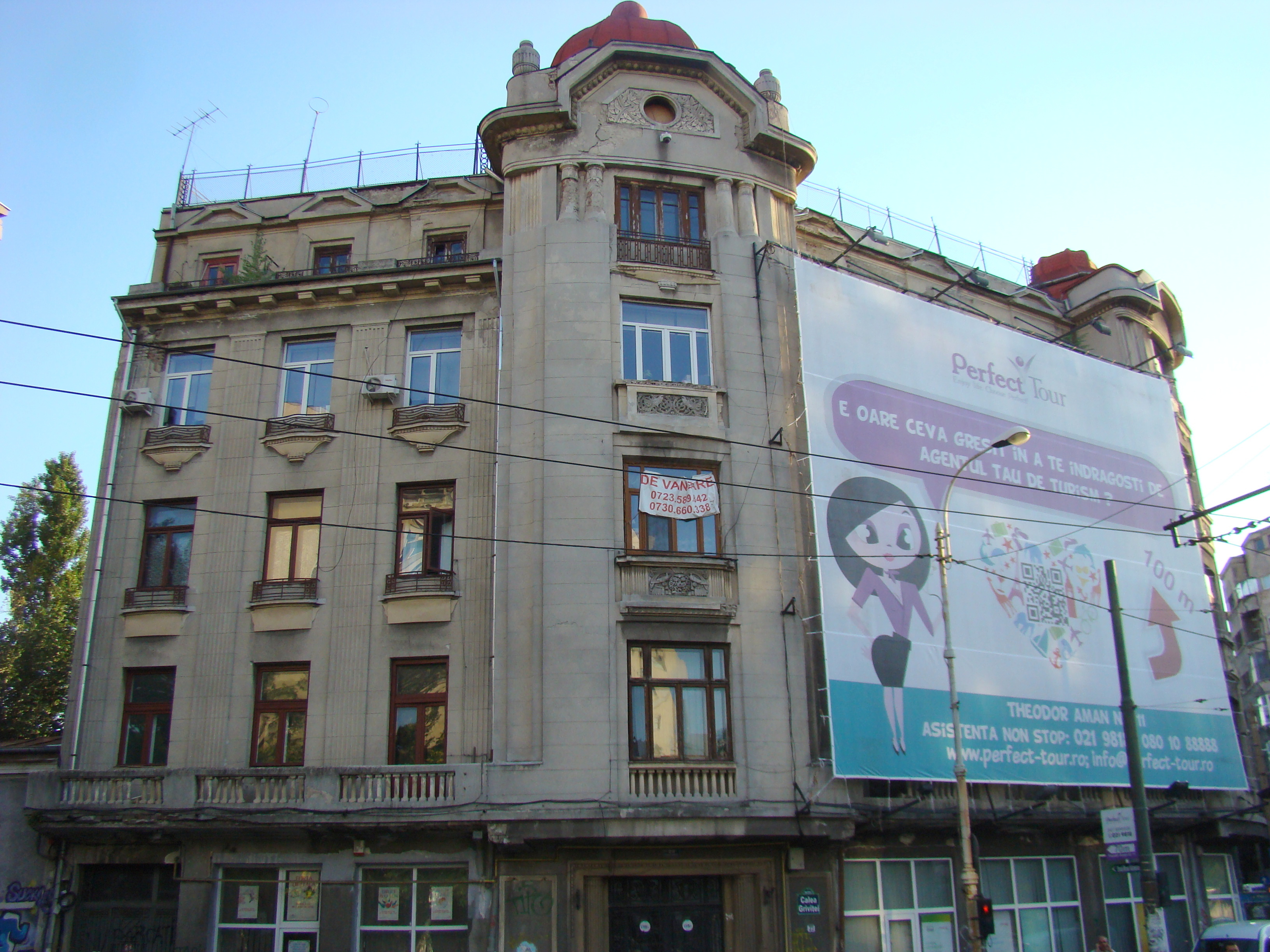 Casă monument istoric, Calea Griviței, nr.23